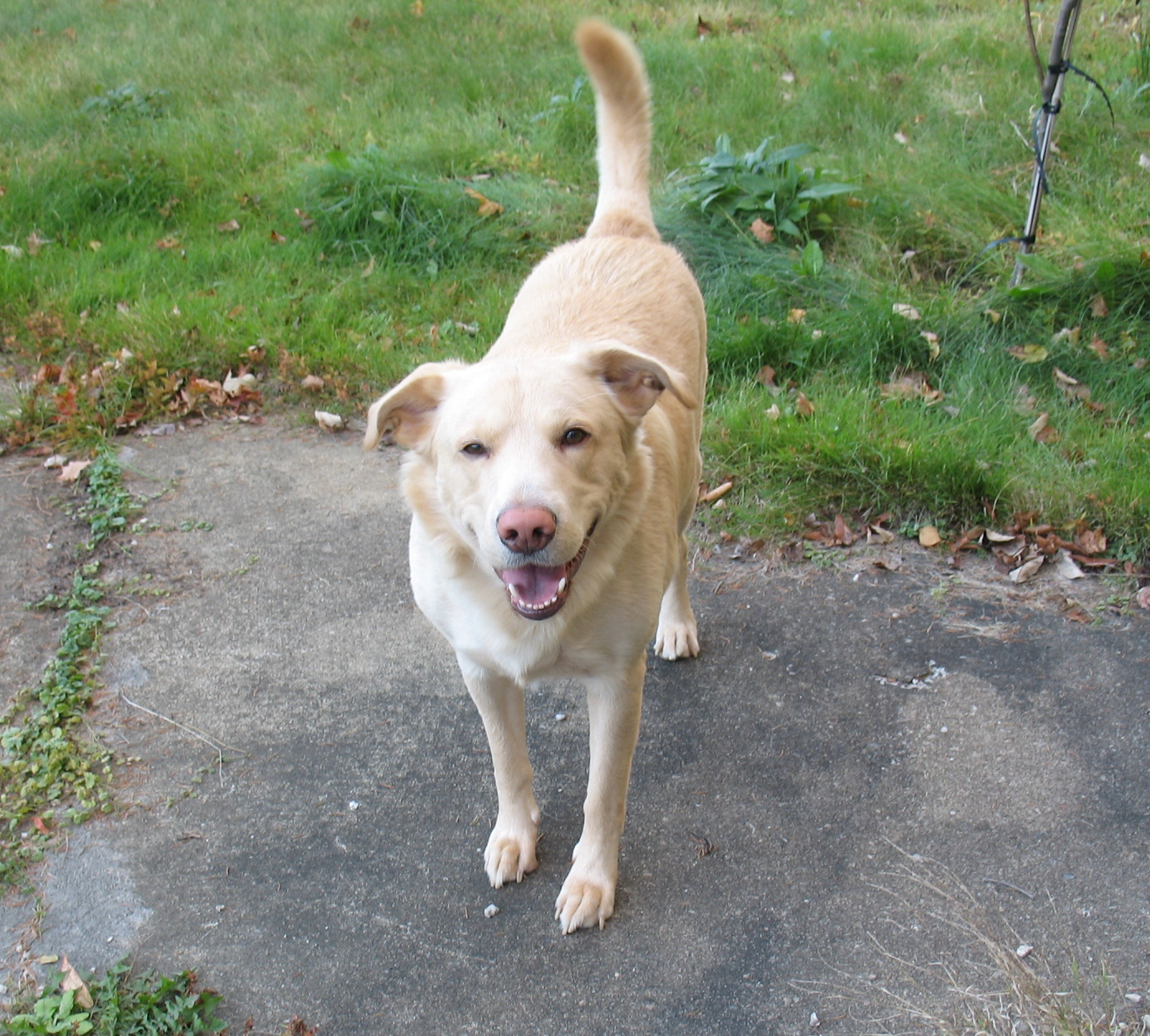 Hybryda owczarka niemieckiego z labradorem retrieverem. (Labrador- German Shepherd Mix)